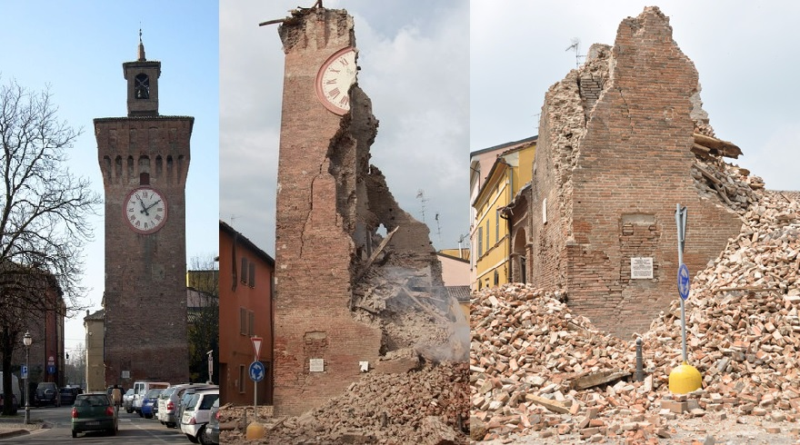 Srequenza del crollo della torre dei modenesi a Finale Emilia durante il terremoto dell'Emilia